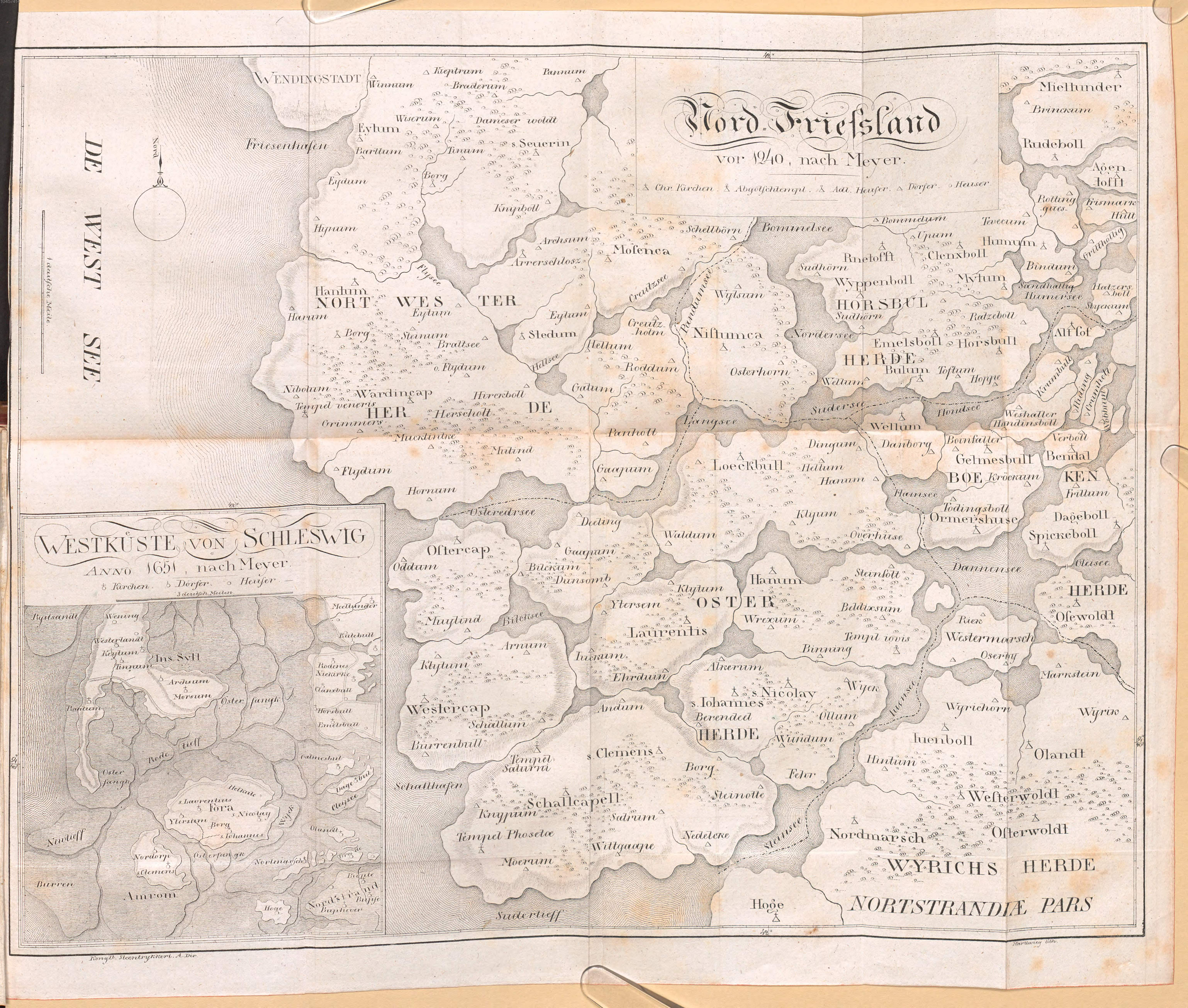 Karte von Nordfriesland. "NordFriesland vor 1240, nach Meyer", links unten mit Inset "Westküste von Schleswig Anno 1651, nach Meyer". Teil des Buches: Friedrich von Warnstedt: Die Insel Föhr und das Wilhelminen See-Bad, Schleswig 1824.